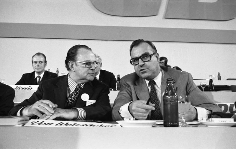 CDU-Parteitag 1972 in der Wiesbadener Rhein-Main-Halle. 9.-11.10.1972